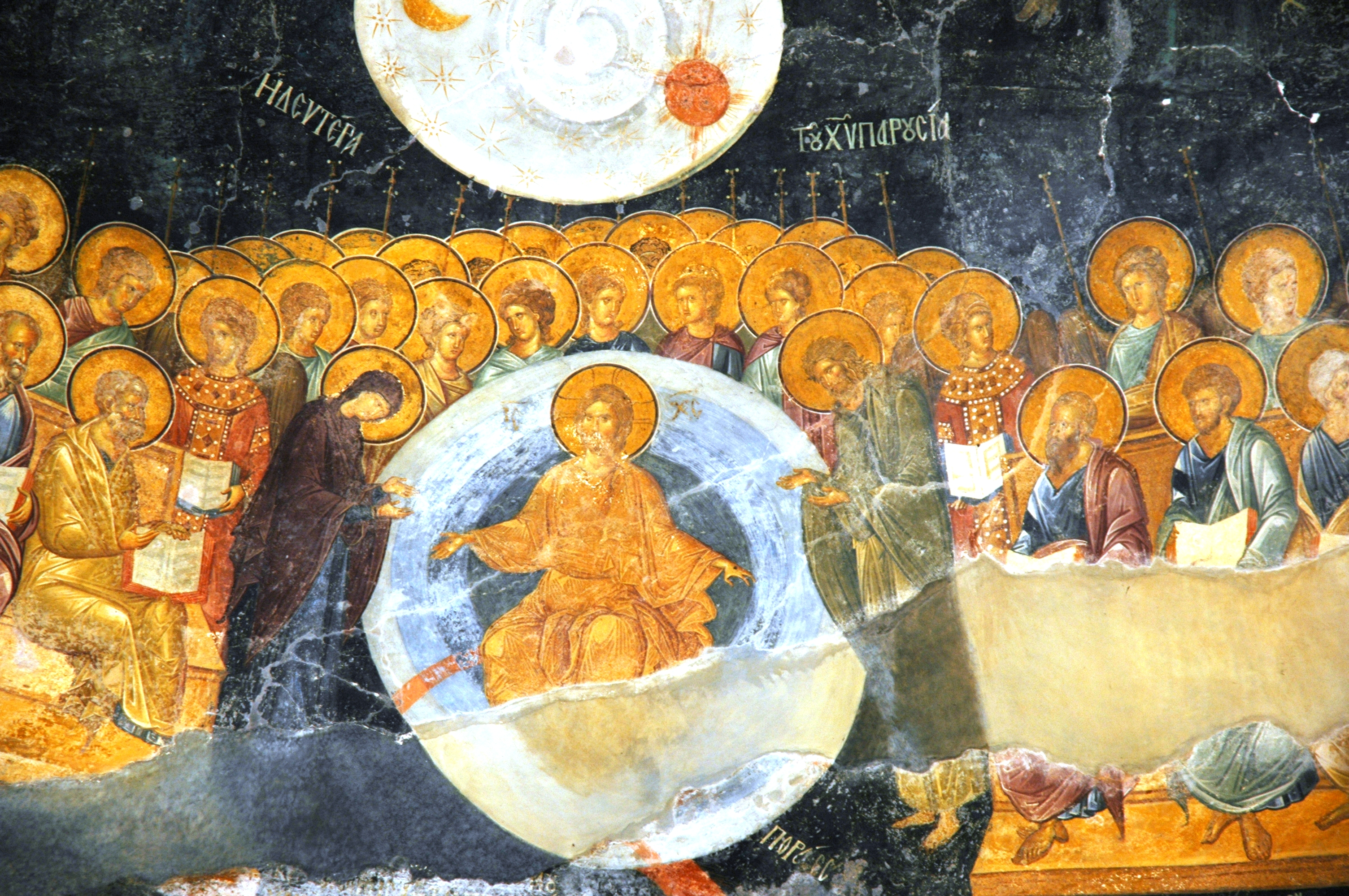 Sant Salvador de Khora - Dia del judici